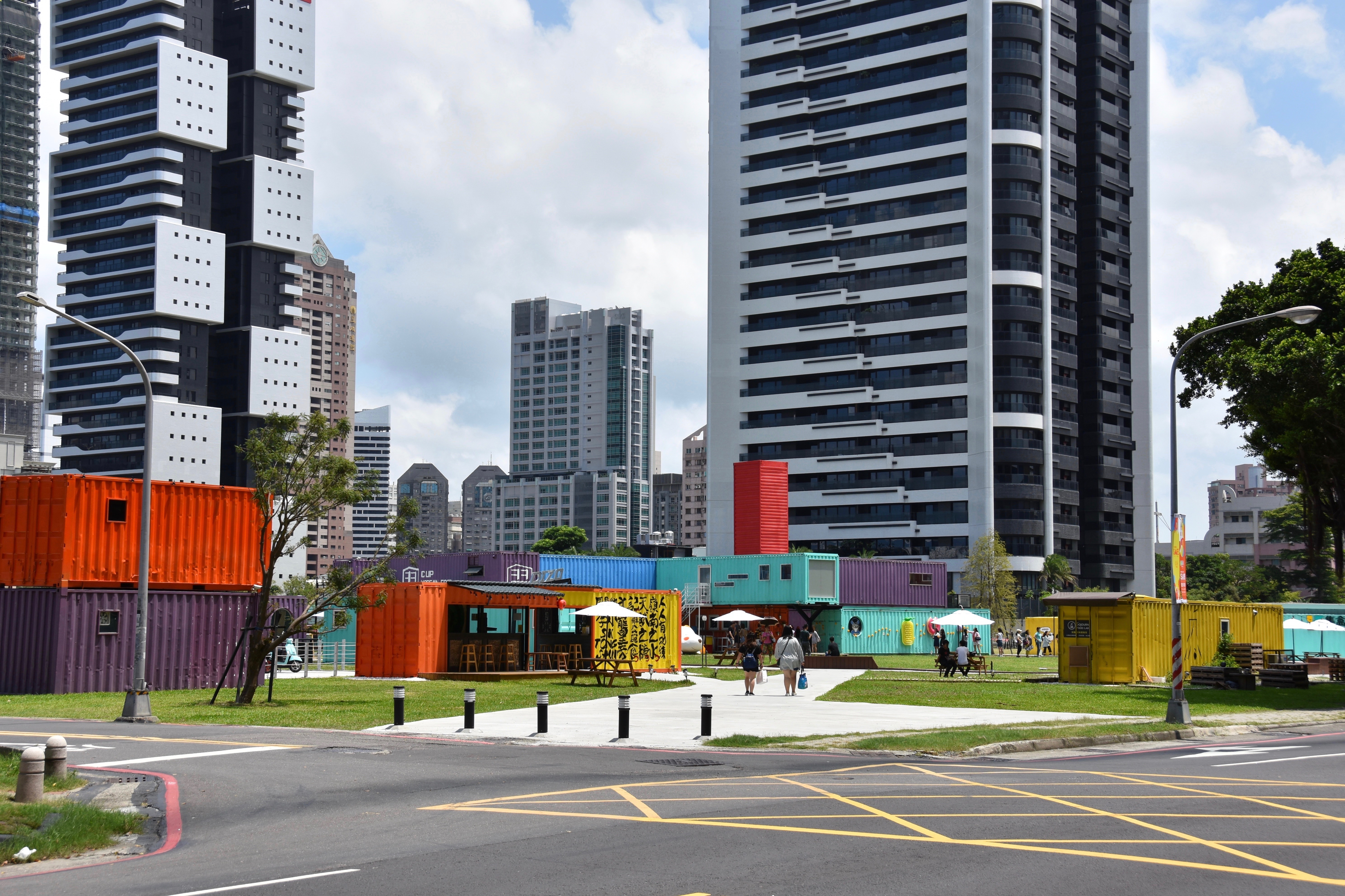 集盒KUBIC貨櫃聚落